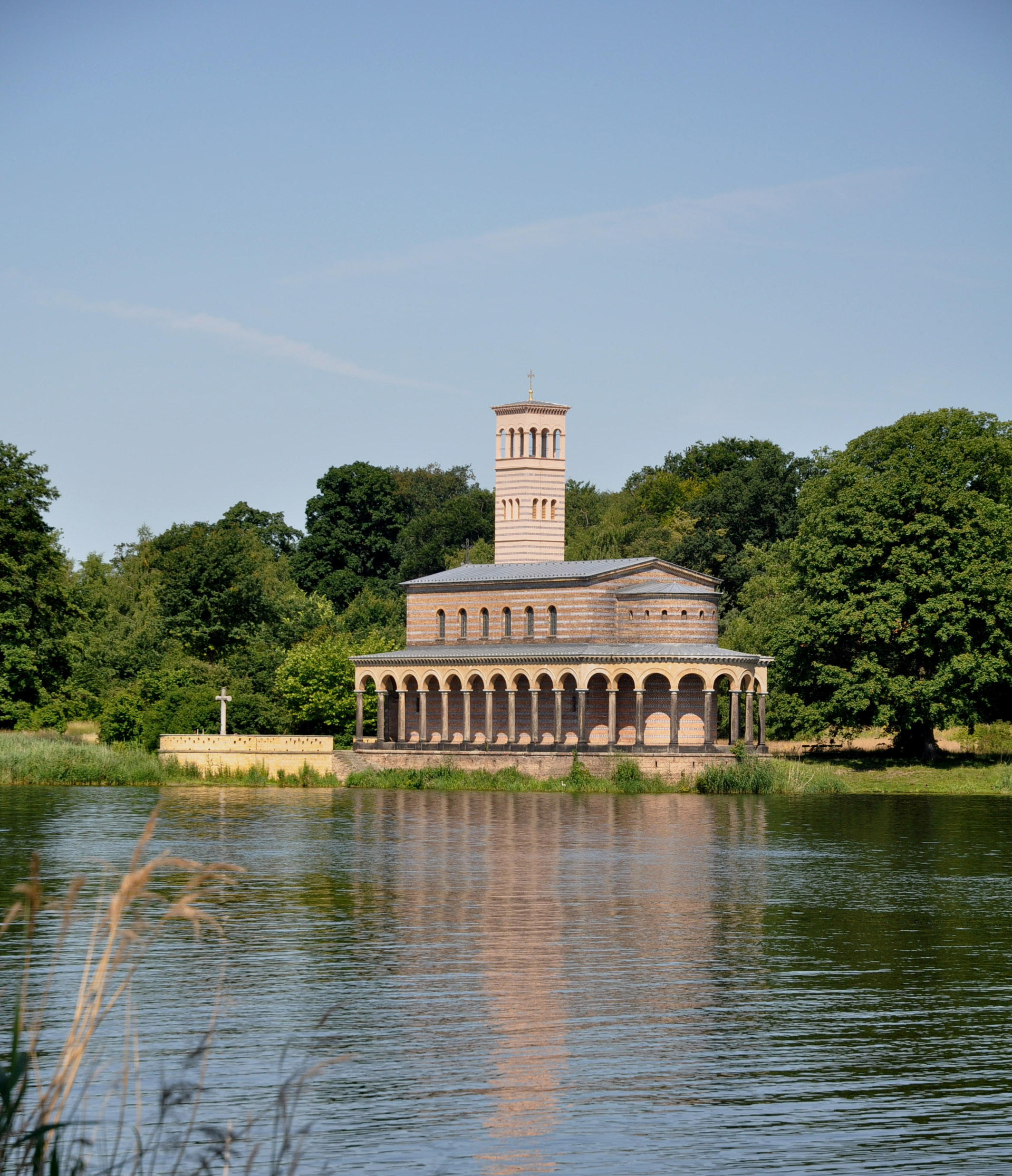 Blick vom Krughorn auf die Sacrower Heilandskirche